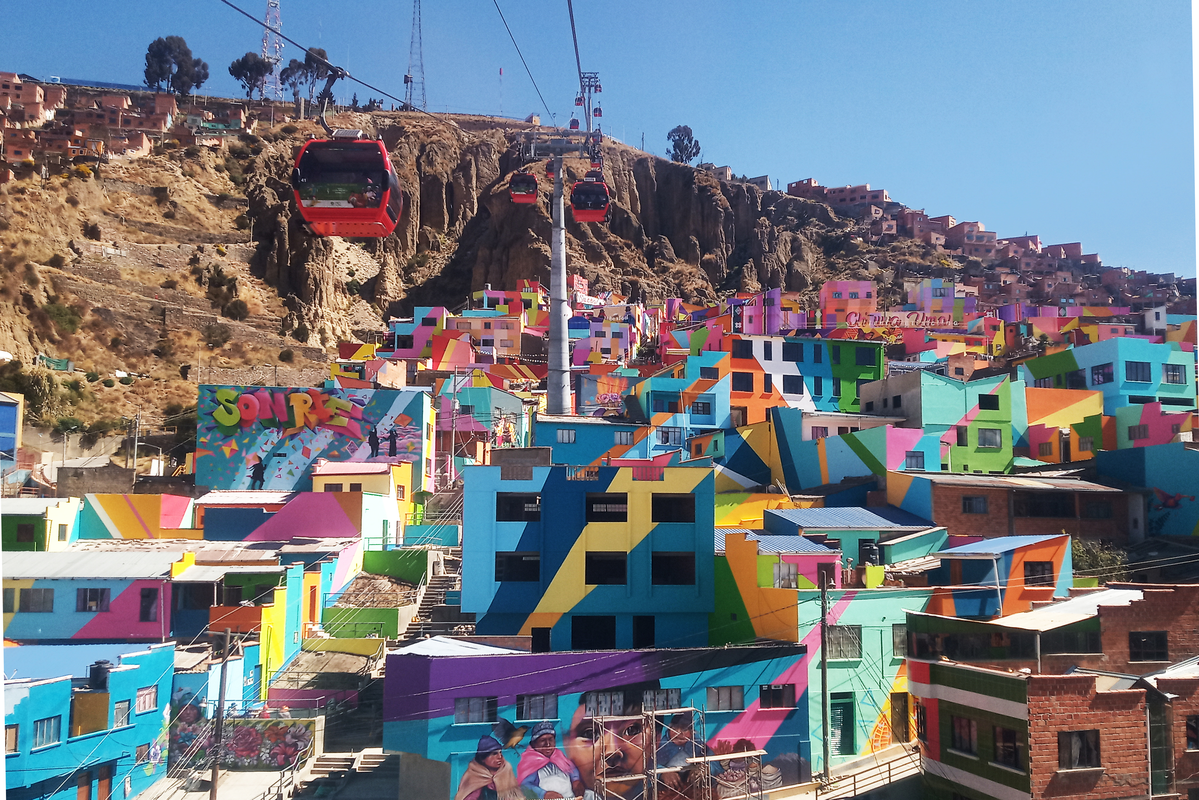 Barrios de Chualluma central y Chualluma Alto, intervenidos mediante un proyecto estatal de mejoramiento urbano y turístico, Obra artística dirigida por la artista Norka Paz.